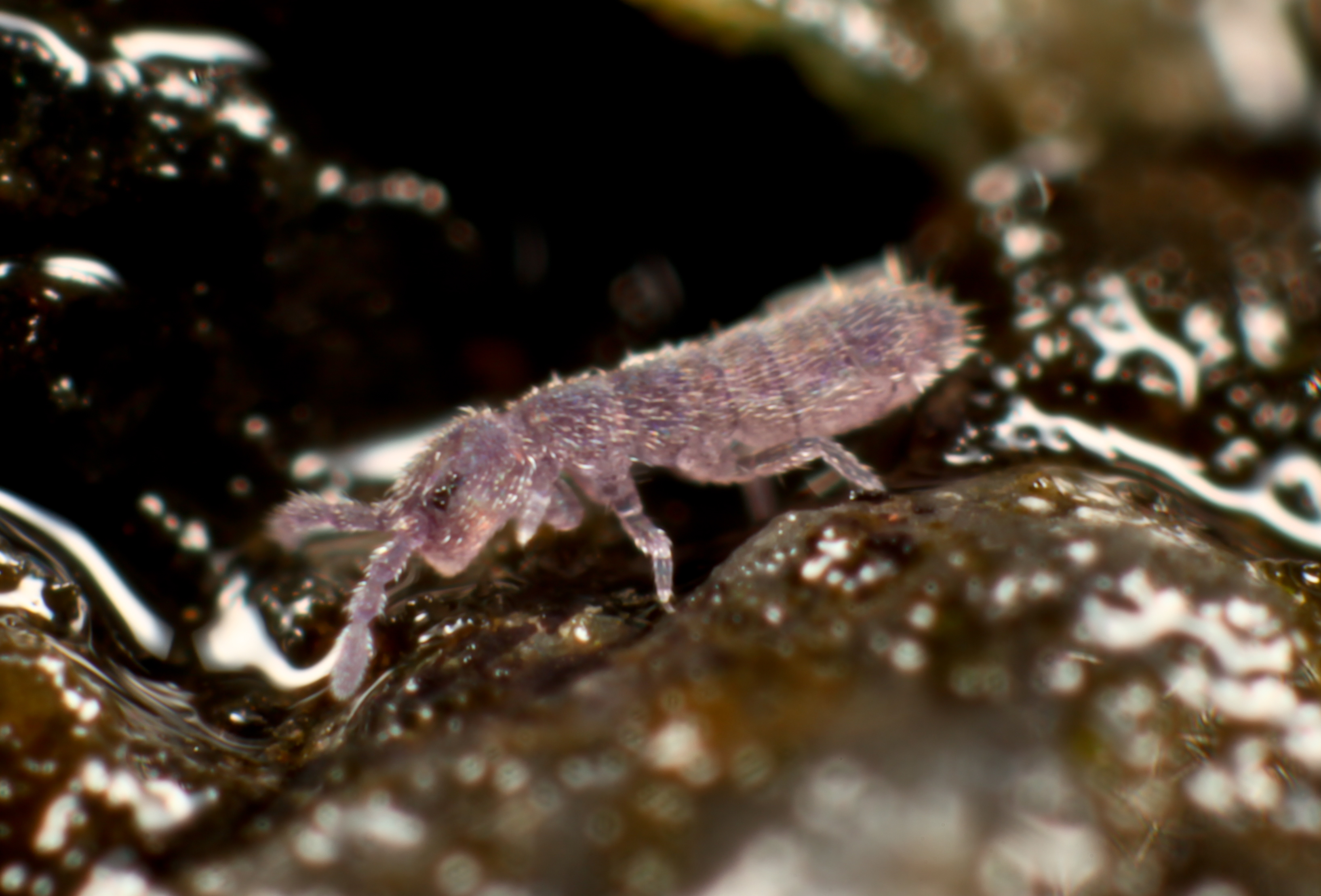 Vertagopus arboreus juvenile from the UK.